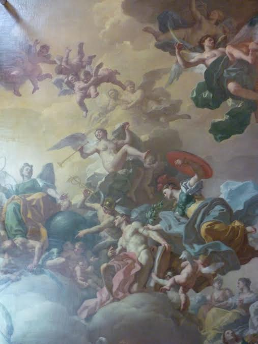 Metafisica (da Dio all'uomo)- fisica - etica (dall'uomo a Dio)